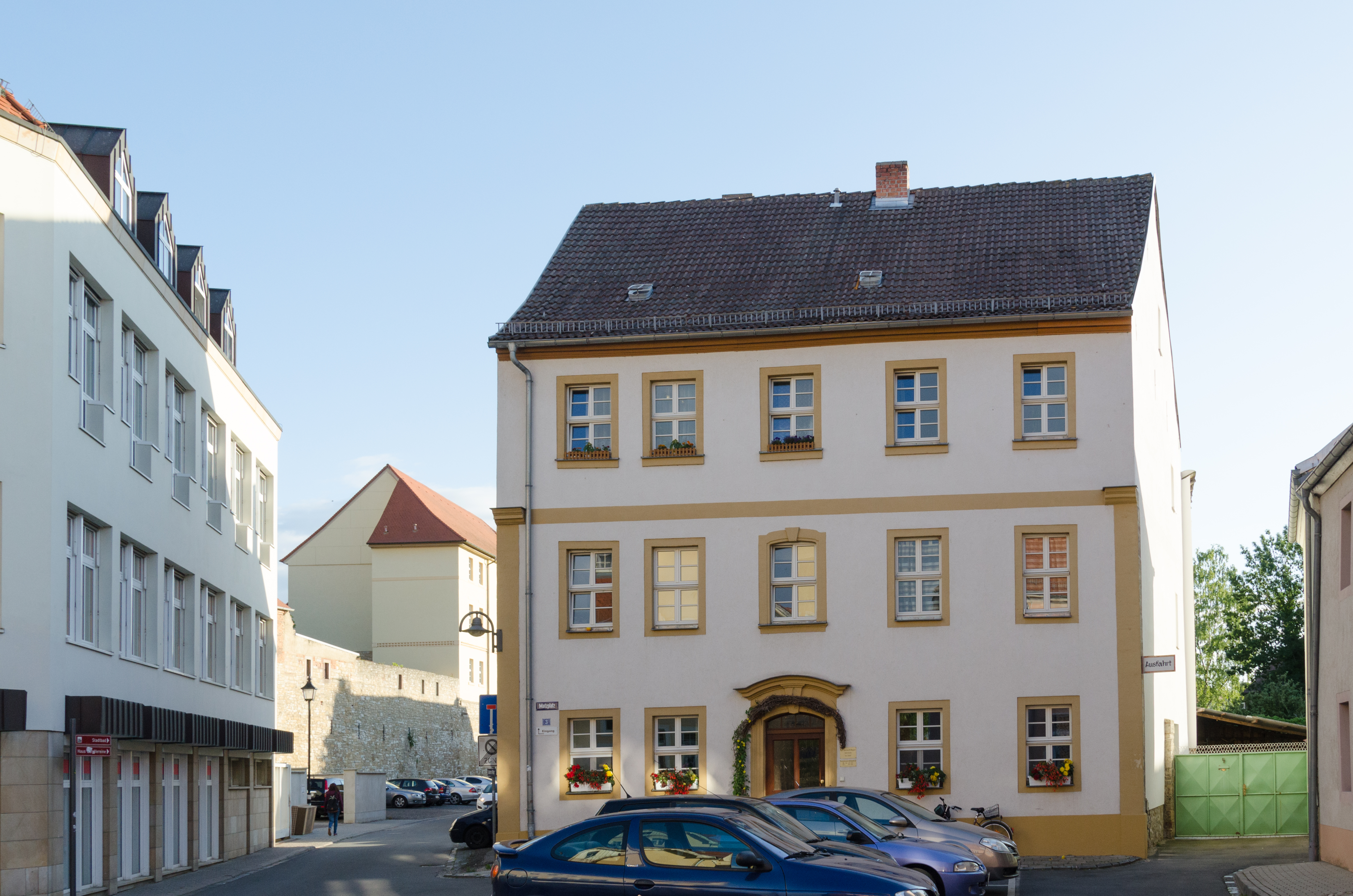 Querfurt, Matzplatz 3